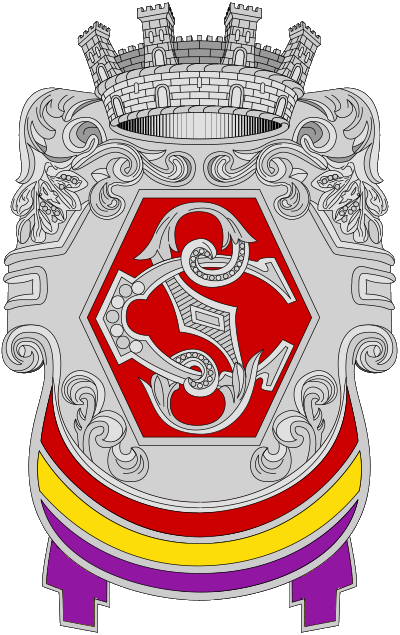 Guardia de Asalto